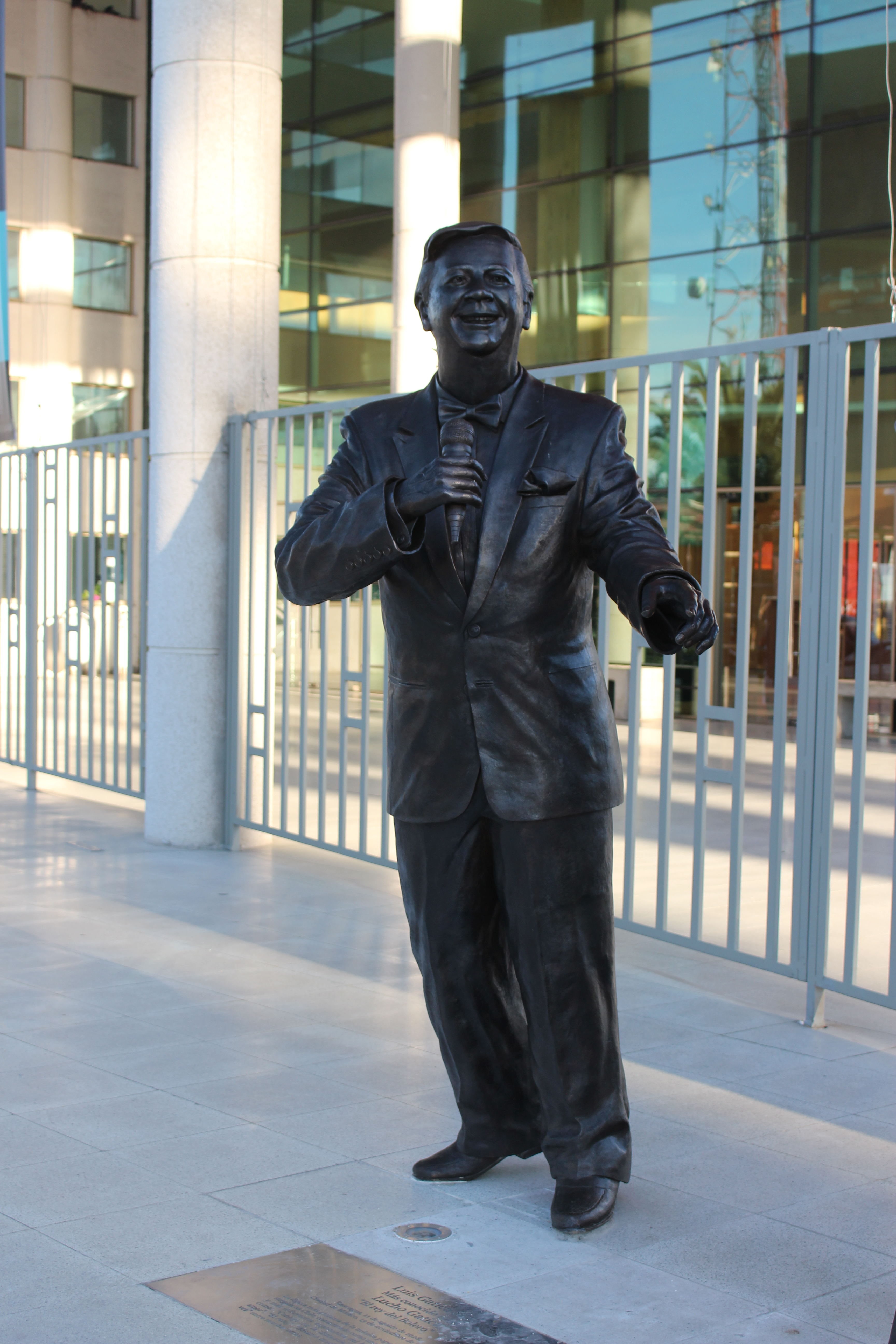 Estatua de Lucho Gatica en frente de Teatro homónimo en la ciudad de Rancagua, Chile